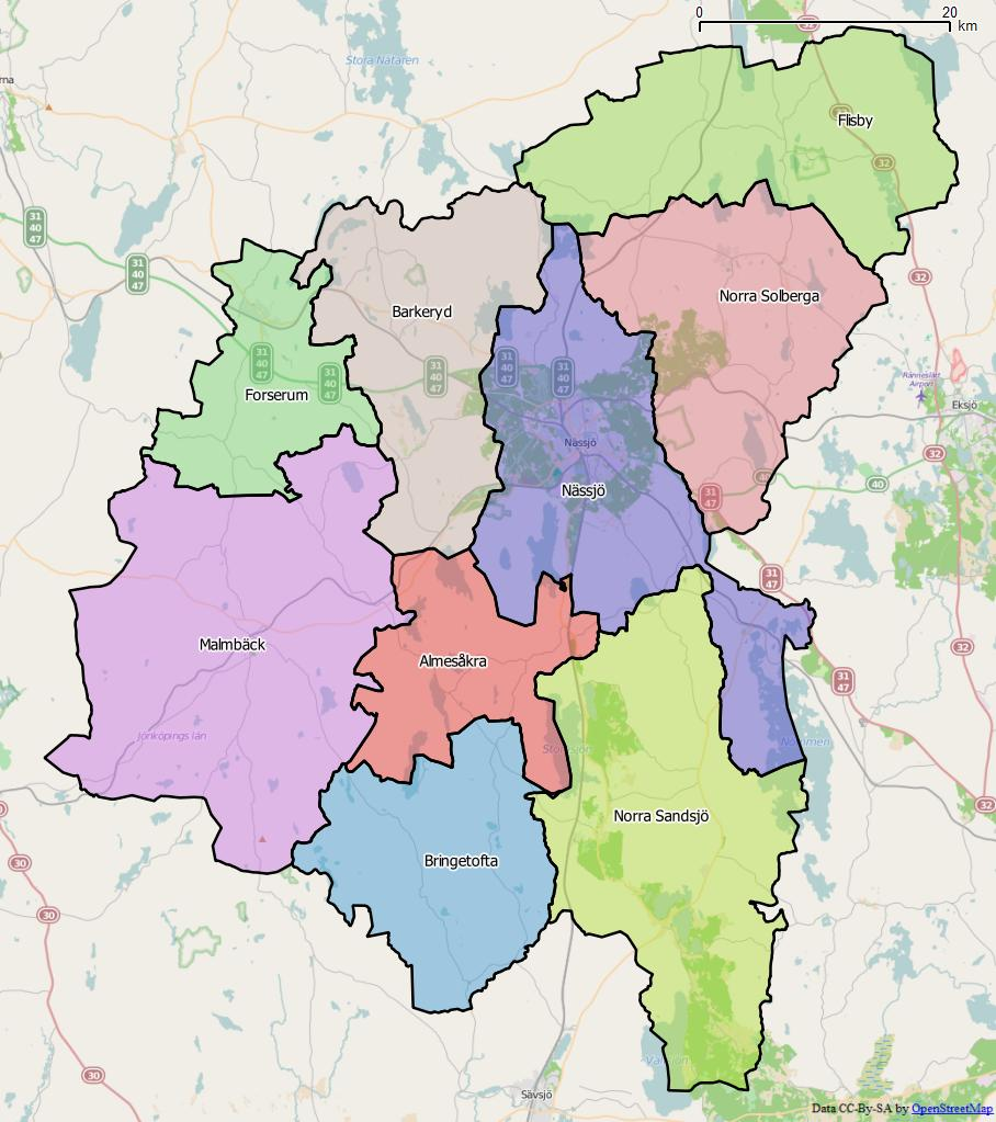 Distriktsindelningen i Nässjö kommun World file: 87.5546696875244379 0 0 -87.5546696875244379 1589911.15248671127483249 7930053.17110125441104174